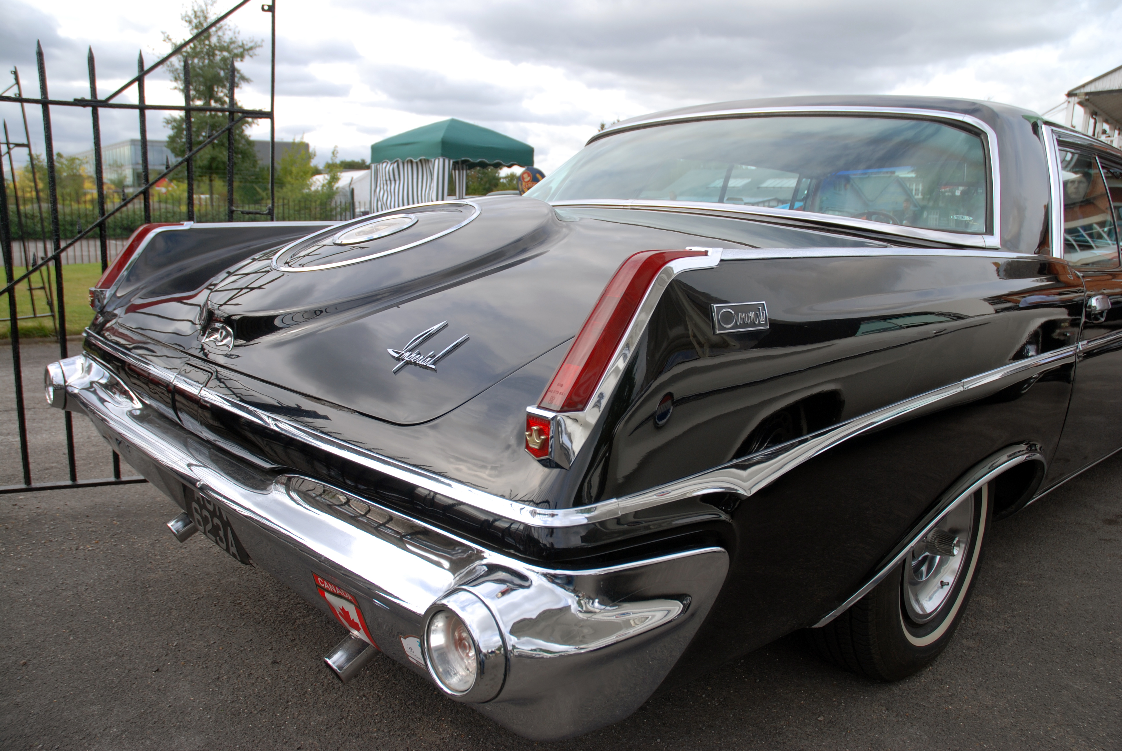 Brooklands,Sep 2009